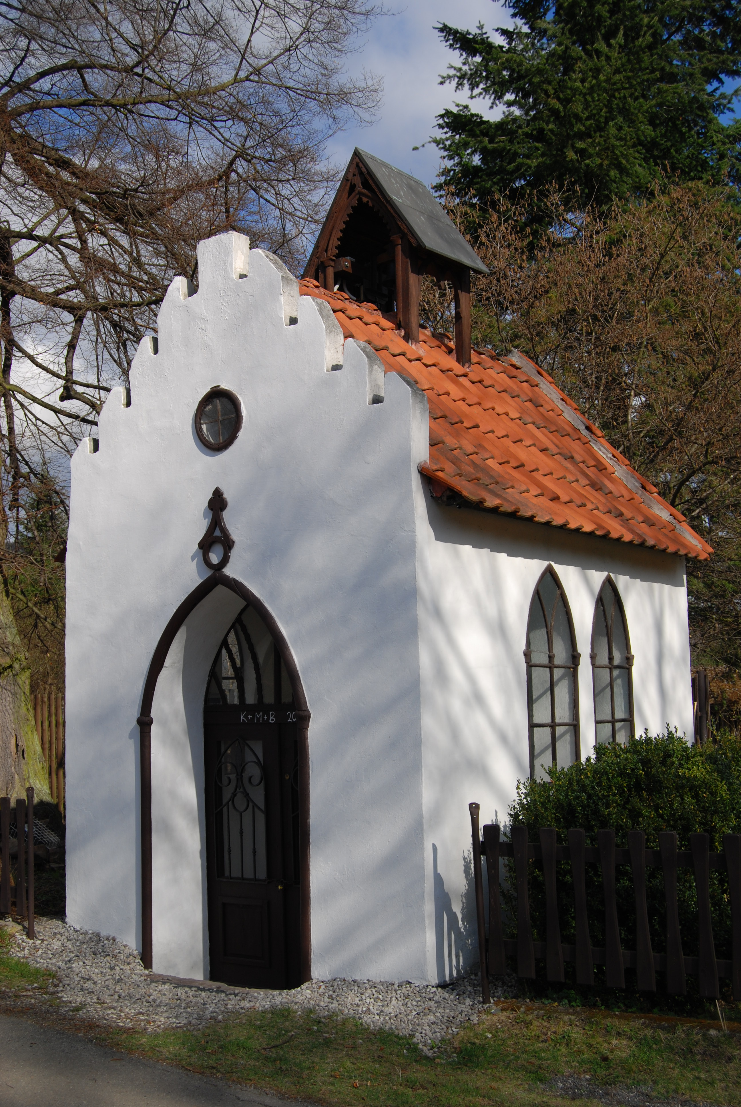 Návesní kaple. Rejkovice je vesnice, část městyse Jince v okrese Příbram. Česká republika.